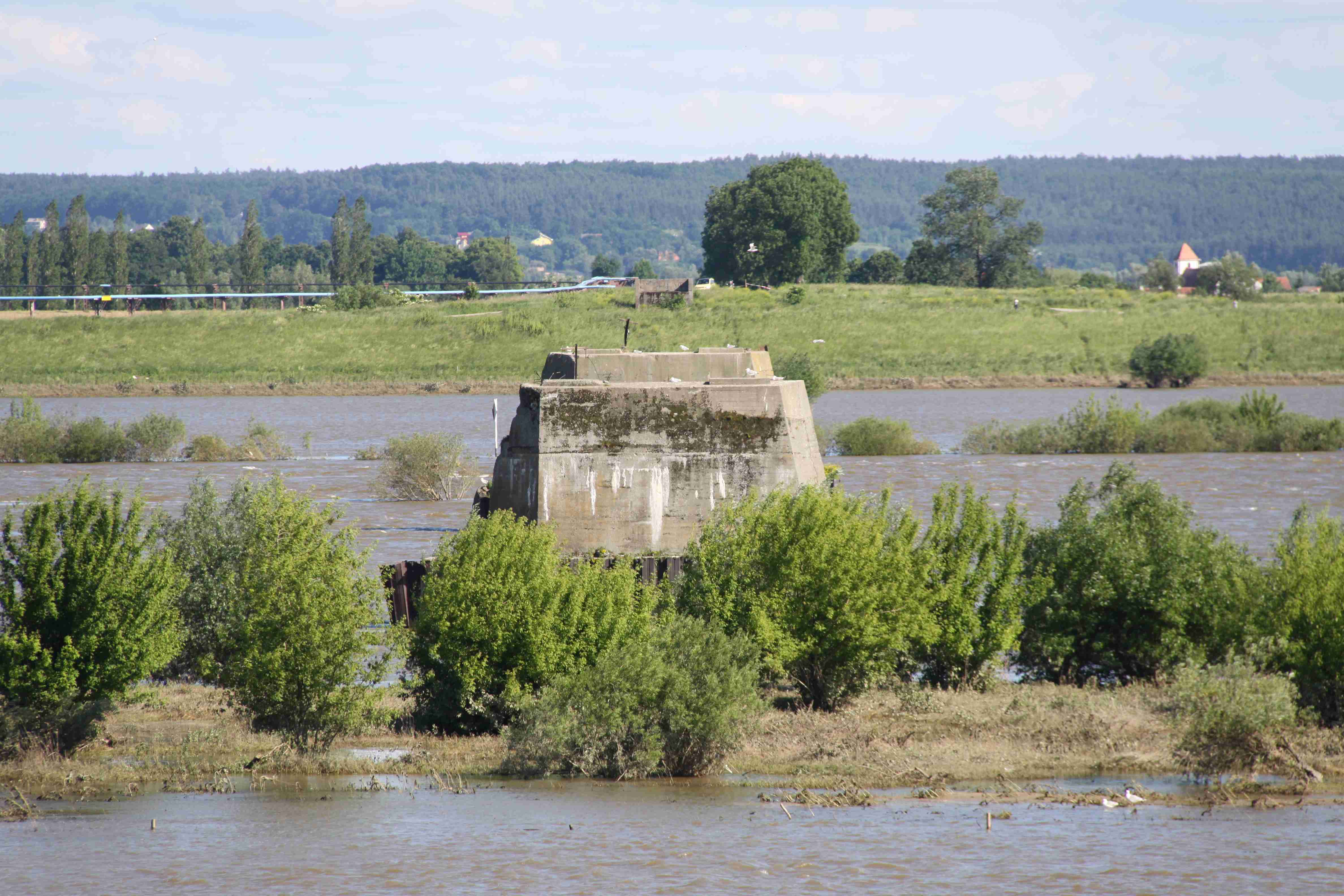 Pozostałości mostu w Opaleniu